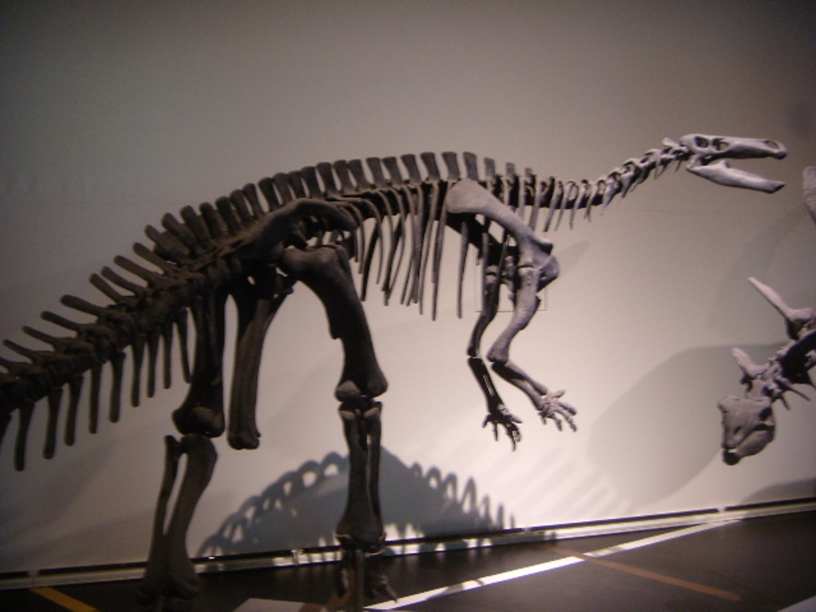 Museo Nacional de Ciencias Naturales